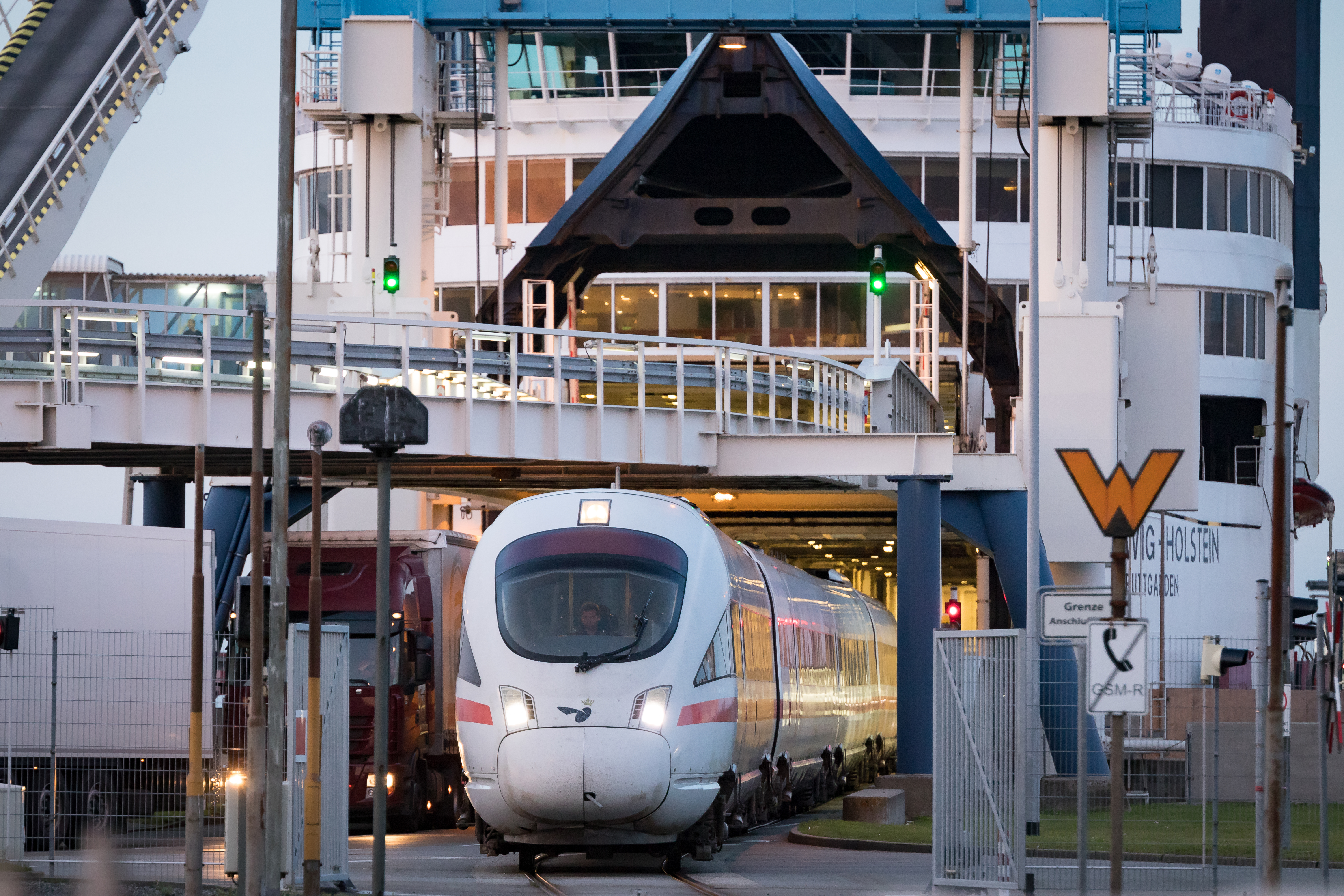 ICE ICE TD von Kopenhagen nach Hamburg verlässt das Fährschiff Schleswig Holstein am Fährhafen Puttgarden